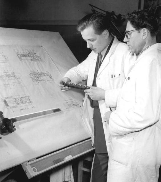 Ingenieure am Reissbrett Zentralbild Krueger 3.4.1957 Leipziger Frühjahrsmesse gab Perspektive zur Vergrösserung des Betriebs.Der Privatbetrieb Zeuke & Wegwerth KG aus Berlin- Köpenick, der elektrischen Spielzeug,z.B. Eisenbahnen und Dampfer baut, konnte bereits am ersten Messetag seine Produktion für das Jahr 1957 durch Verträge binden. Ausserdem wurden für das Jahr 1958 zahlreiche Perspektivverträge abgeschlossen. Herr Wegwerth, der kaufmännische Leiter des Betriebs, sagte dass sie bisher noch auf keiner Messe so große Abschlüsse tätigen konnten wie auf der dies jährigen Leipziger Frühjahrsmesse. Auf Grund der Perspektive, die diese Abschlüsse bieten, wird der Betrieb zur Zeit vergrössert, da ausserdem im III.Quartal die Produktion der TT-Bahnen (12 mm Spur) aufgenommen wird, für die bereits Auslandsinteressenten vorhanden sind. Die Firma exportiert bereits nach Finnland, Österreich, Dänemark und Polen. UBz: Chefkonstrukteur Stahmann (links) und Konstrukteur Schmidt besprechen eine Weiterentwicklung an der TT-Bahn (12 mm Spur)